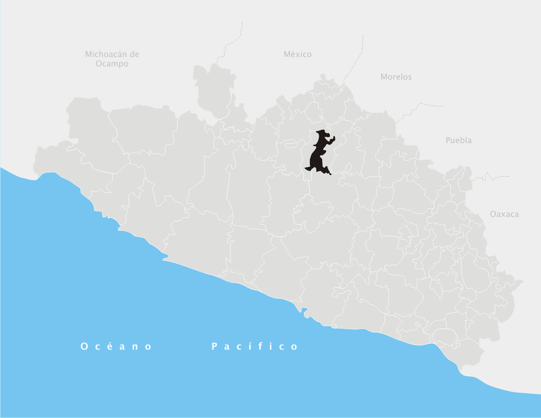 Cocula en el estado de Guerrero (México)